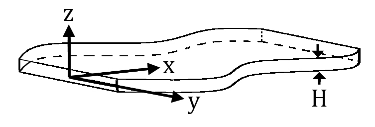 הגיאומטריה אשר מכתיבה זרימת הלה-שו.